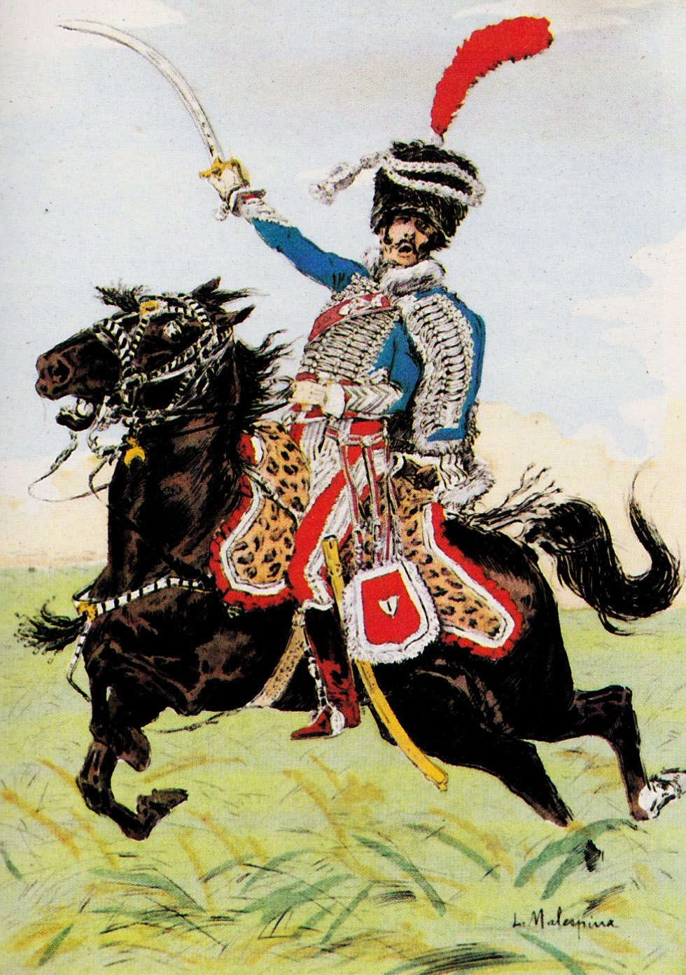 Chef d'escadron du 1er régiment de hussards à la charge. Illustration établie d'après Martinet.